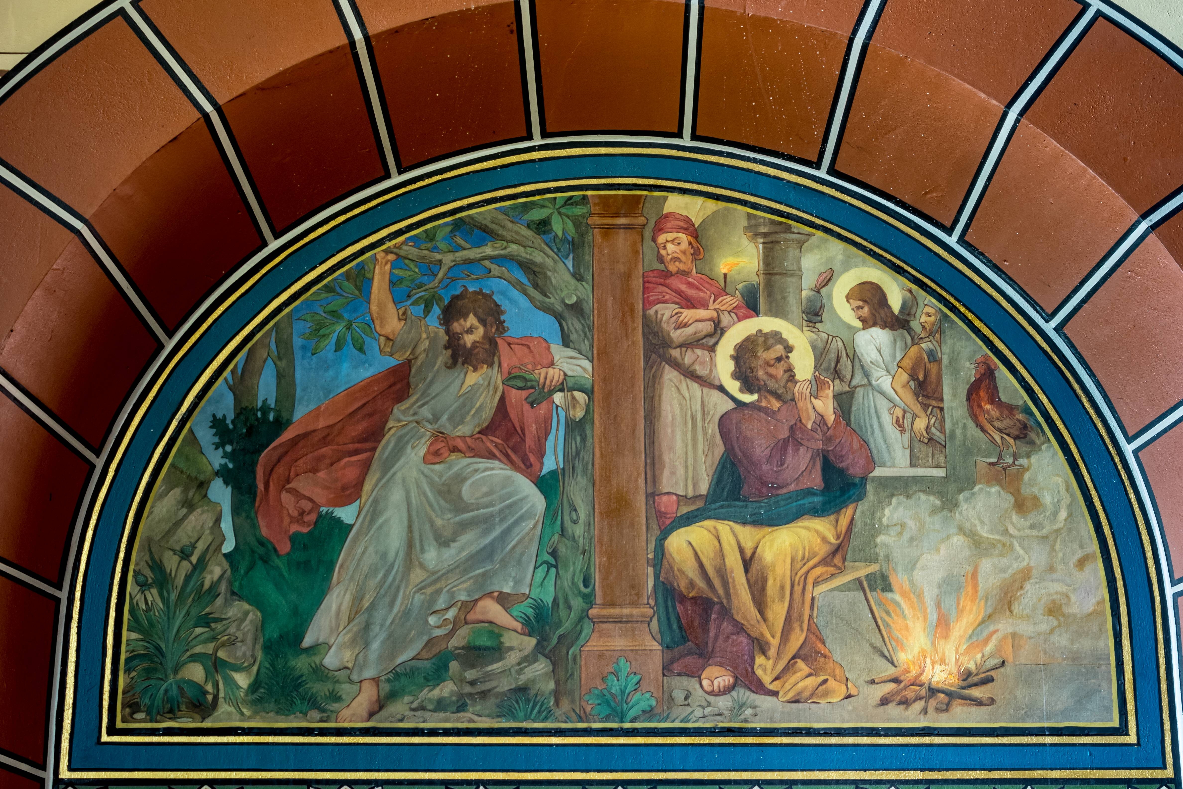 St. Peter und Paul in Bonndorf. Zweigeteiltes Bild zum Thema Buße. Links falsche Reue, durch die Verzweiflungstat Judas (Suizid) und die dreimalige Verleugnung Jesu durch Petrus im Hohenpriesterlichen Hof. (Noch ehe der Hahn kräht, wirst du mich dreimal verleugnen).